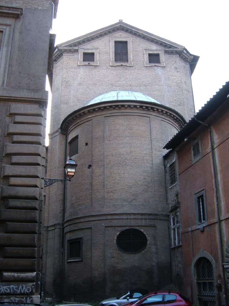 Chiesa monastica della Santissima Annunziata, a Roma, nel rione Campitelli. Foto personale.